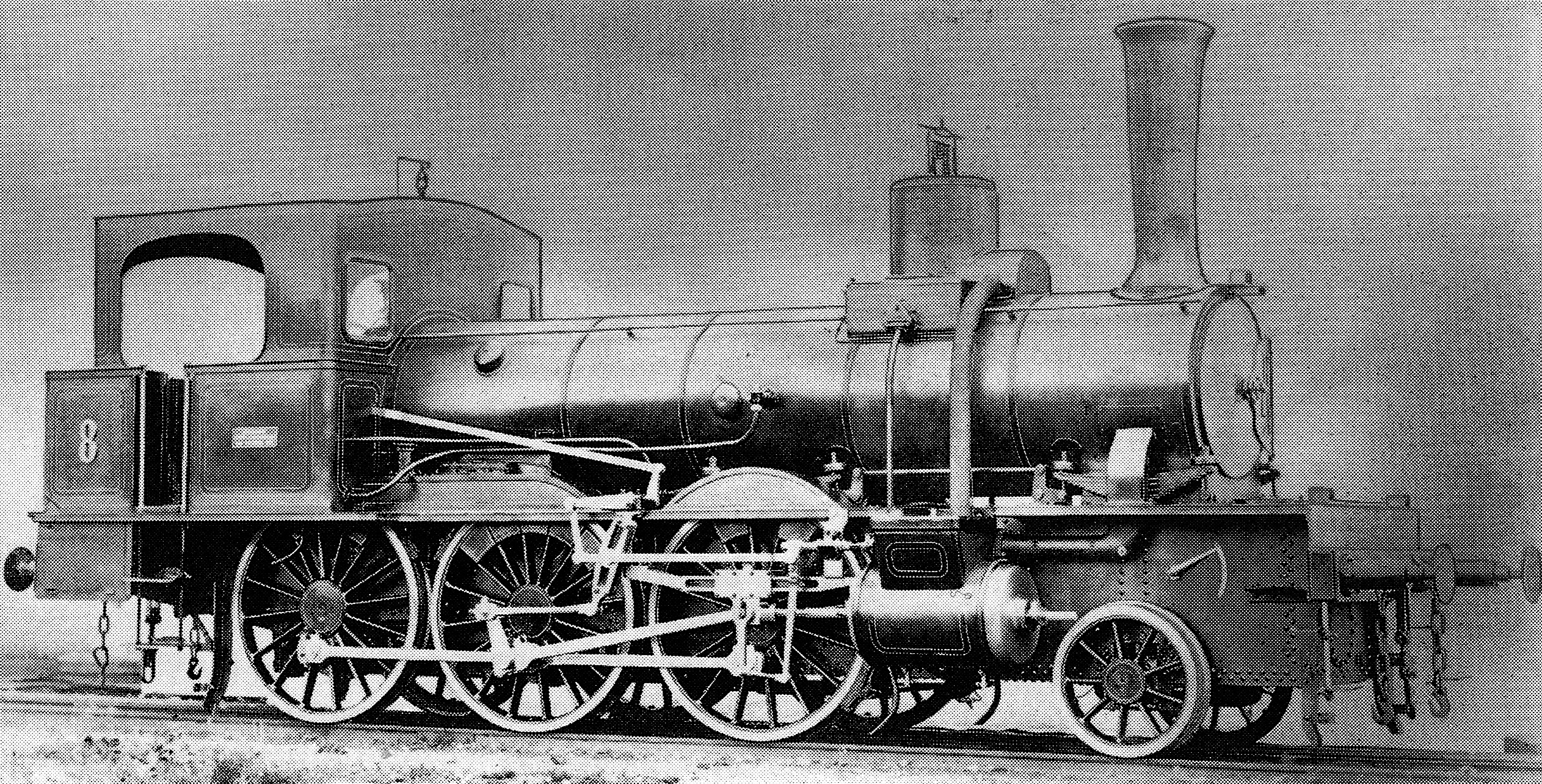 Lokomotive Nr. 8 der Serie A der Schweizerischen Nationalbahn, gebaut 1875 in der Schweizerischen Lokomotiv- und Machinen-Fabrik in Winterthur (Fabr-Nr. 81), 1880 von der Nordostbahn übernommen als F Nr. 263 (ab 1887 A3; ab 1895 Nr. 153), 1896 außer Dienst gestellt und anschließend abgebrochen.